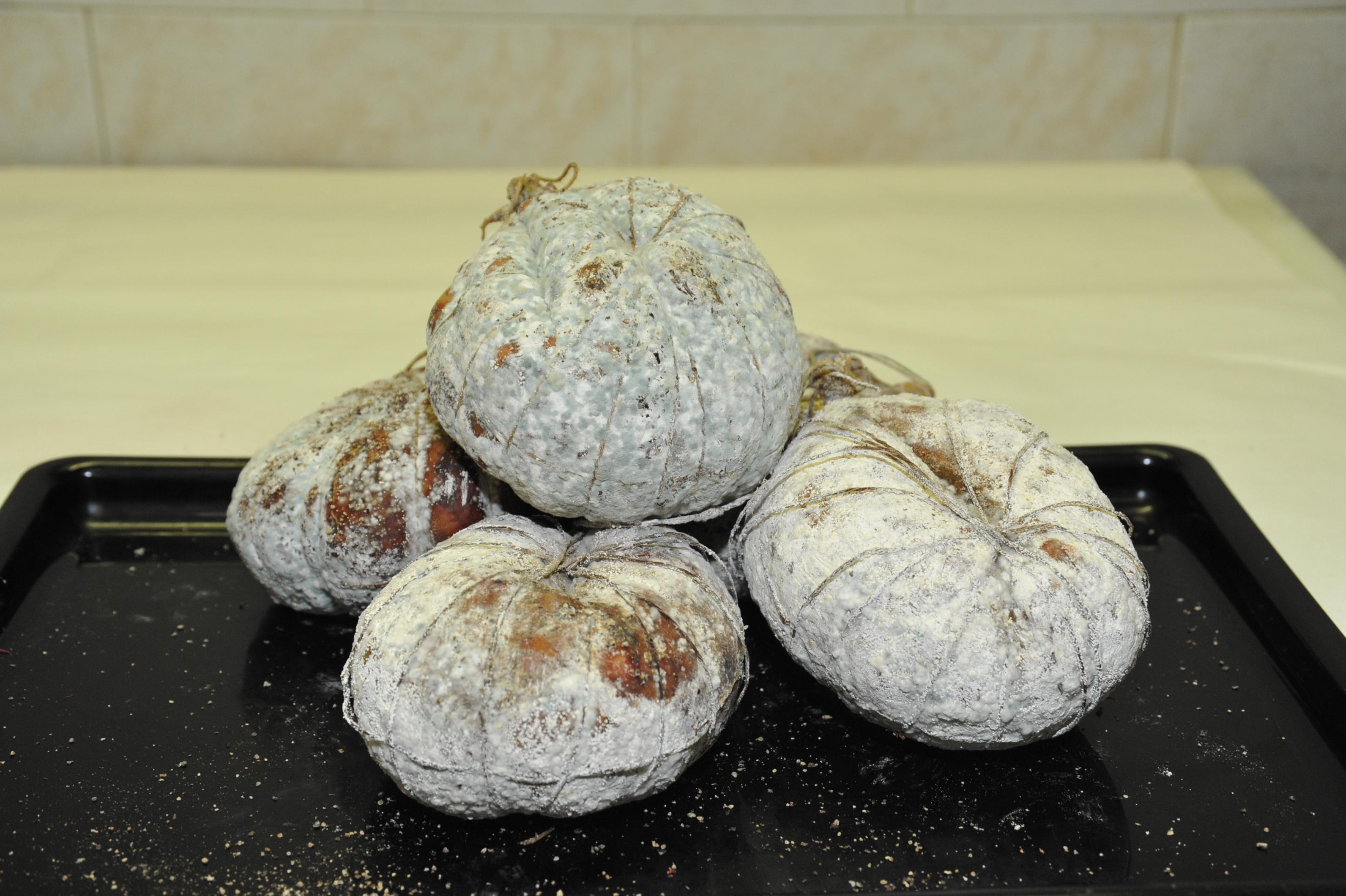 Mortadella di fegato della Valsassina